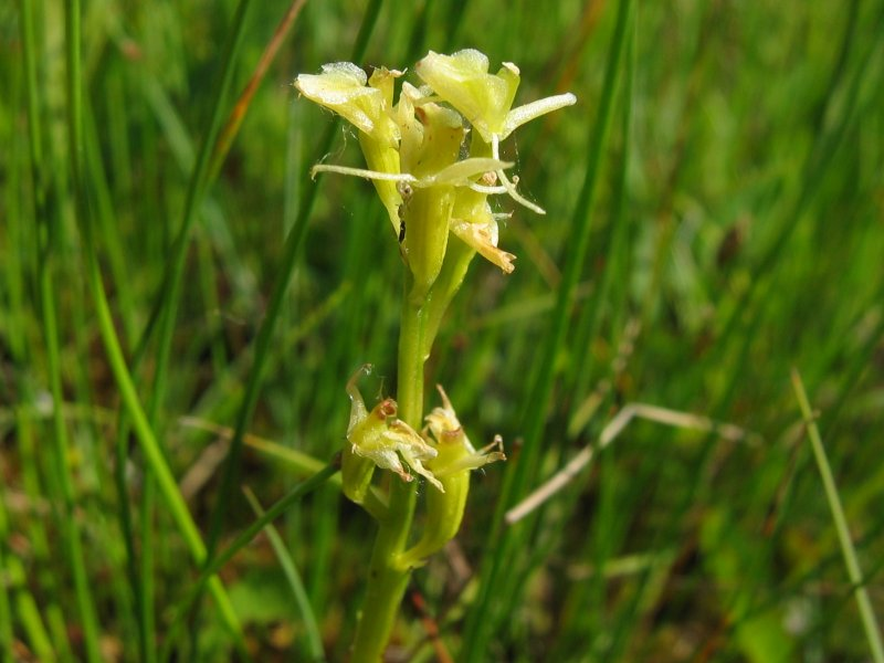 Sumpf-Glanzkraut Liparis loeselii, Müritz-Gebiet, FFH-Art